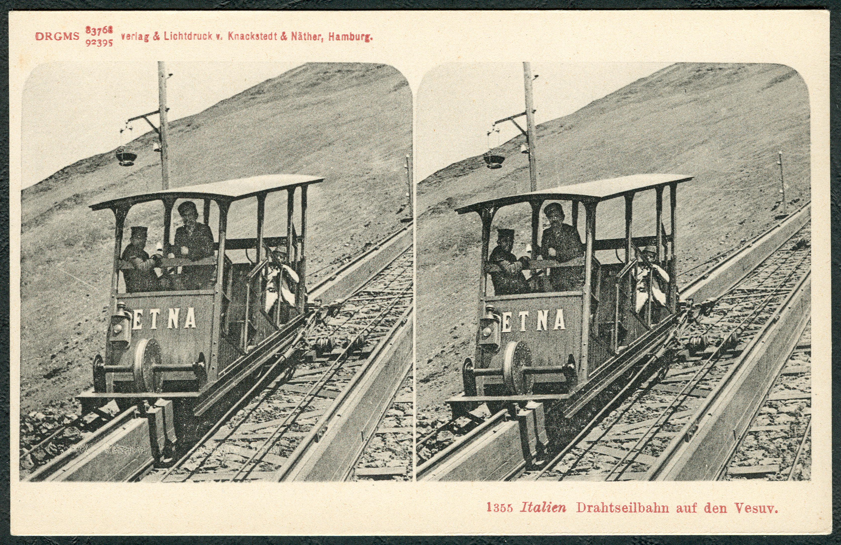 Stereoskopie als im Lichtdruck vervielfältigte Ansichtskarte der Firma Knackstedt & Näther mit der fortlaufenden Nummer 1355, hier mit einem Blick auf „Italien. Drahtseilbahn auf den Vesuv“ ...